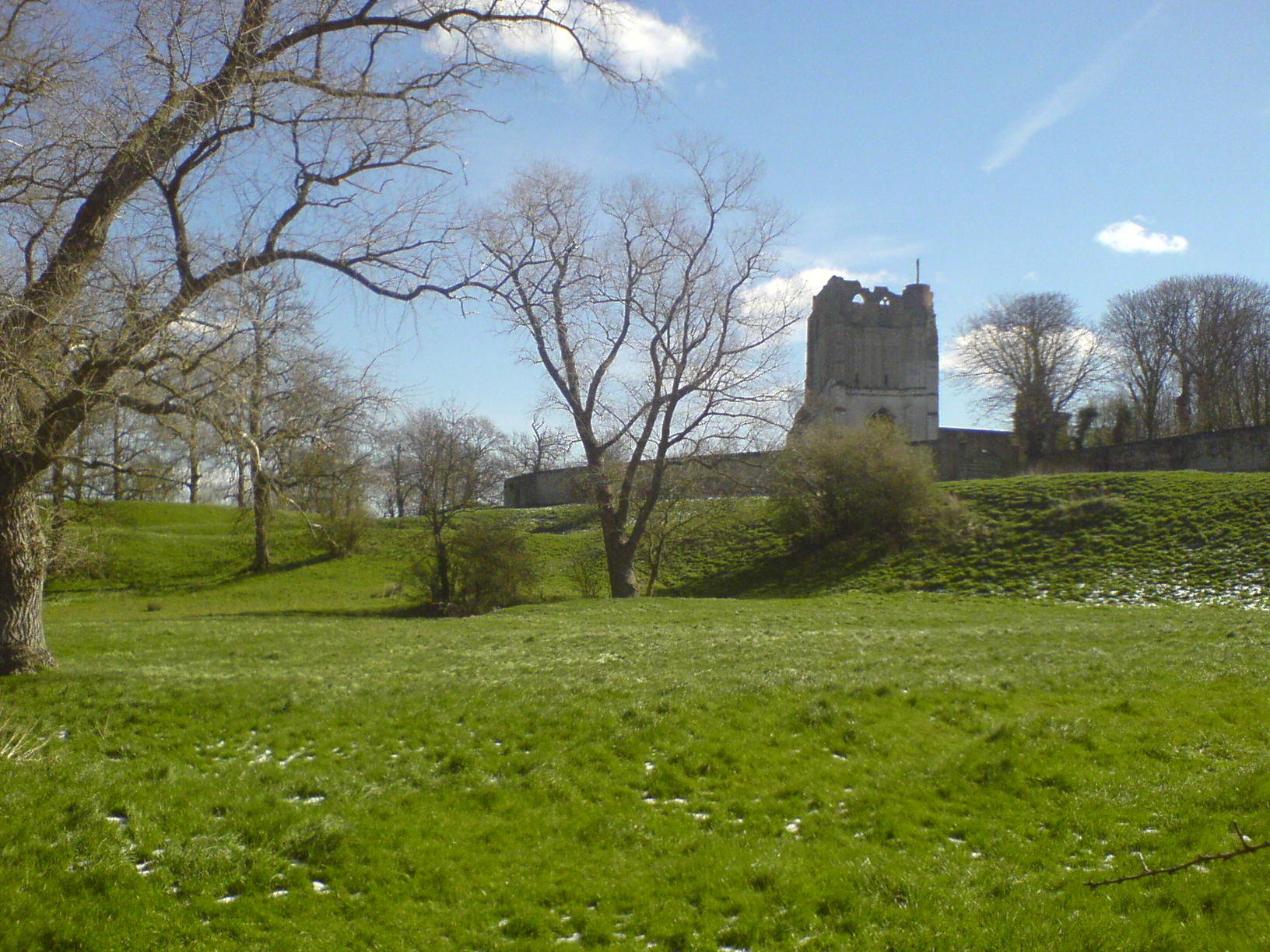 La Tour de l'Abbaye Notre-Dame du Mont